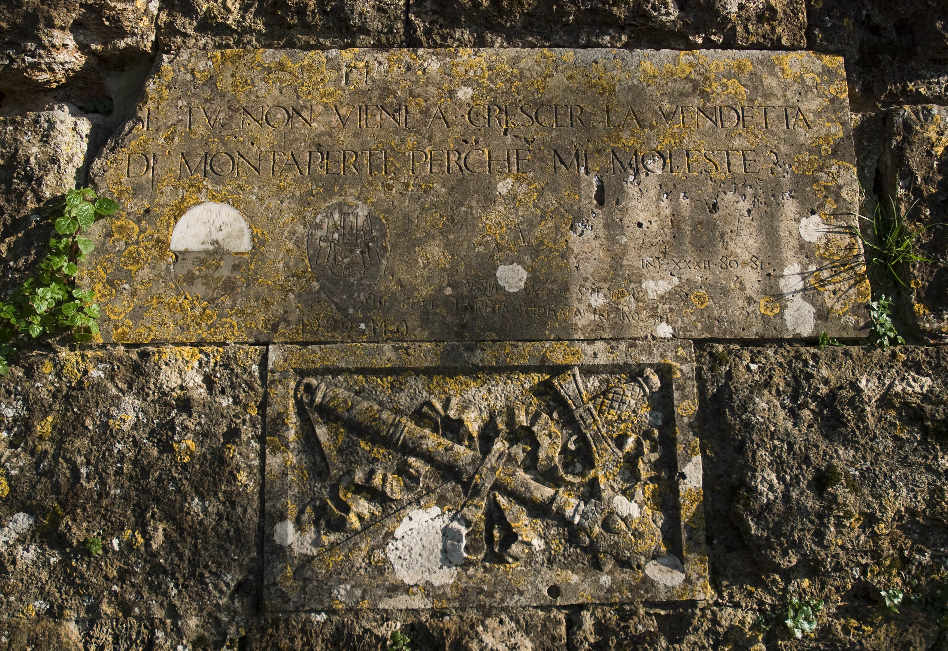 lapide sulla piramide a montaperti